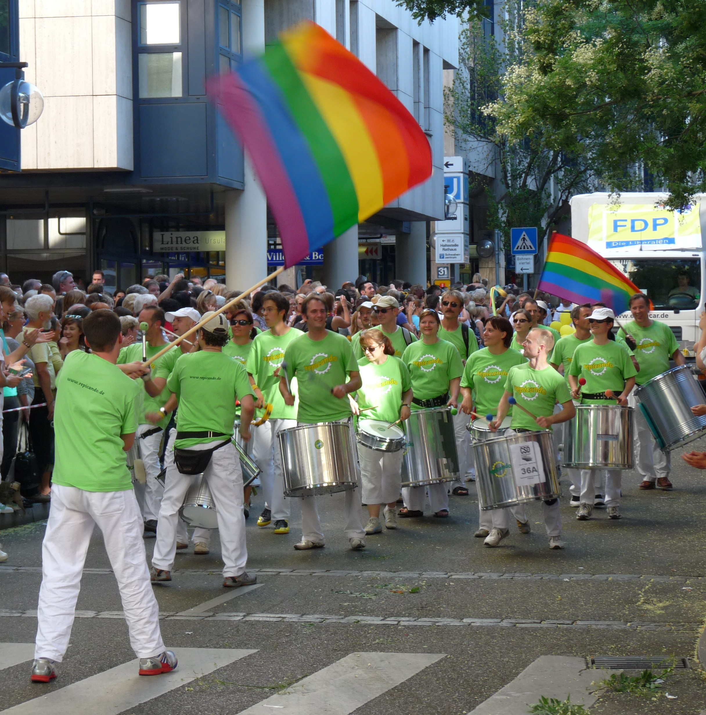 Stuttgart_-_CSD_2009_-_Parade - Repicando: LGBT Sambatrommler